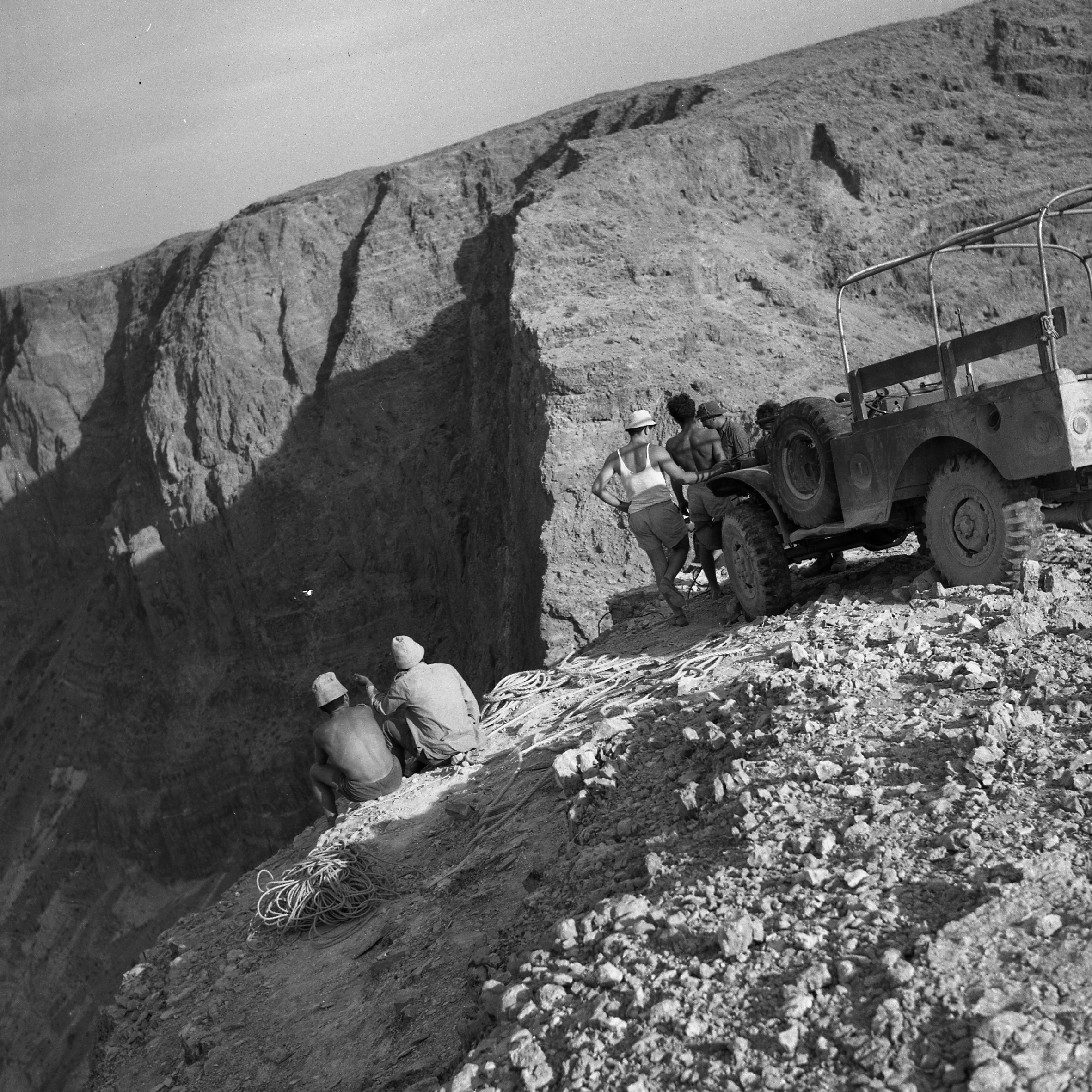 סקר ישראל עיגון ופינוי הסולם מעל מערת האימה